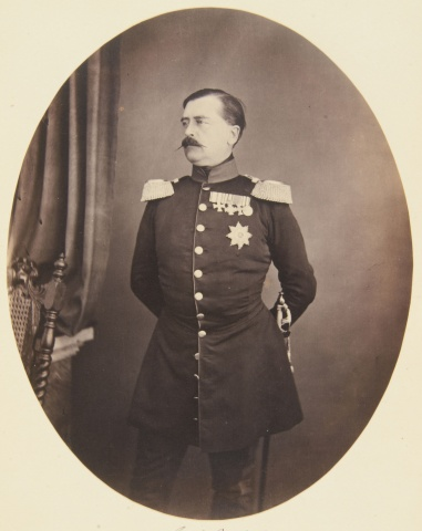 Charles-Antoine de Hohenzollern (1811-1885) en 1858